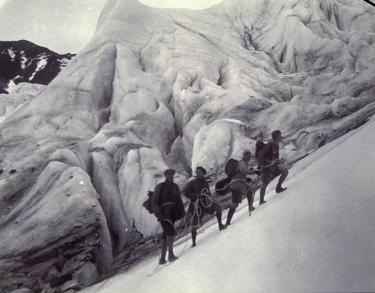 depicted place: Lappland, Kiruna, Kebnekaise (Sverige (SE))